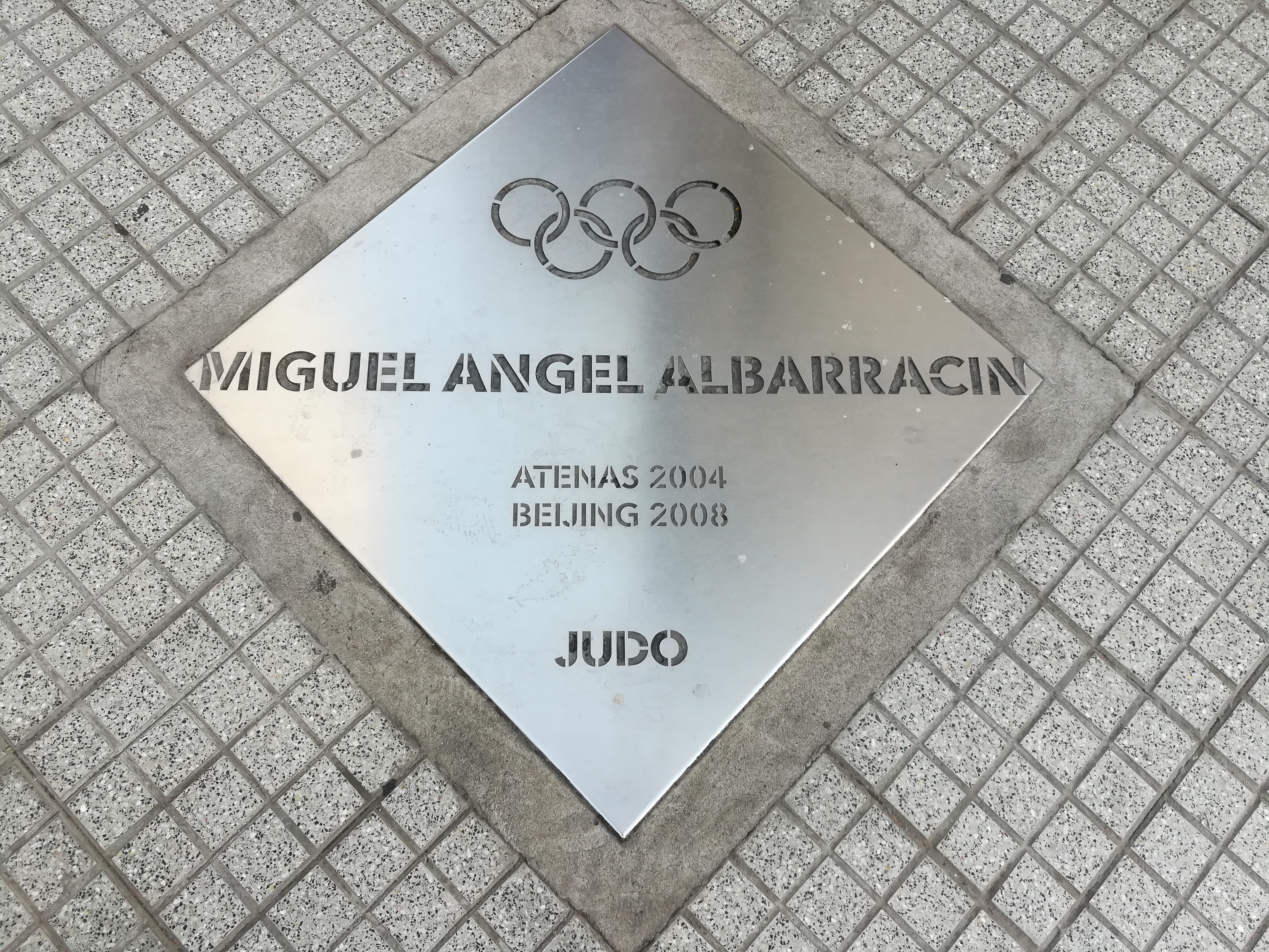 Paseo de los Olímpicos de los en la Avenida Pellegrini (Rosario).